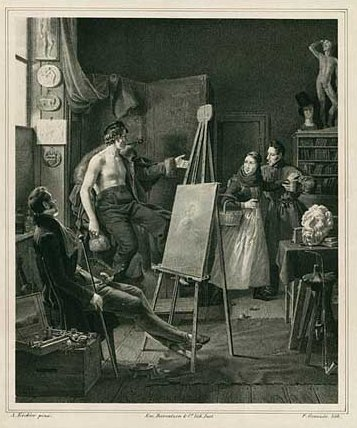 Malerne Wilhelm Bendz (1804-1832) tv og Christian Frederik Carl Holm (1803-1846) th i atelier med modeller